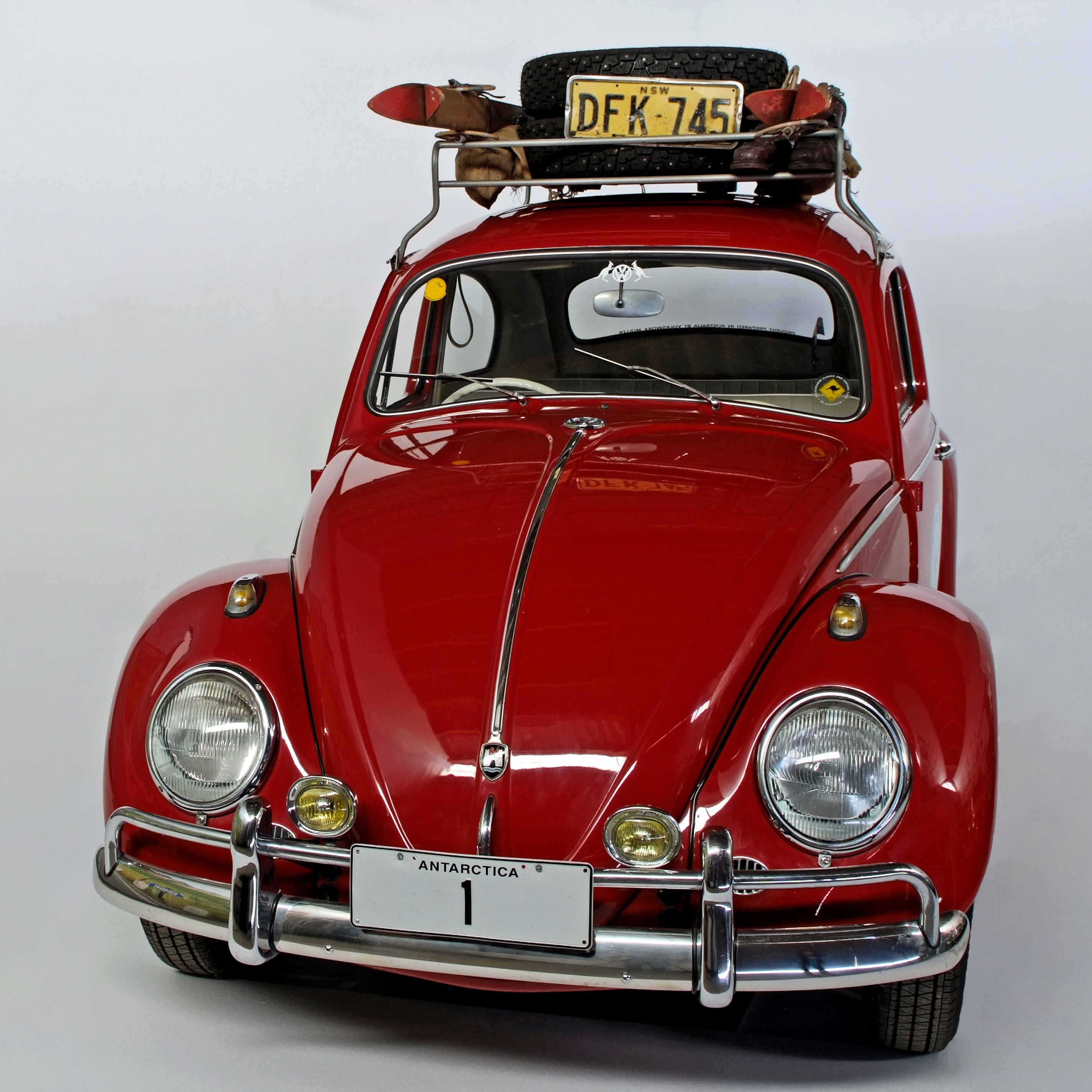 VW 1200 Export, Nachbau (2002) des "Antarctica 1" (Bj. 1962)